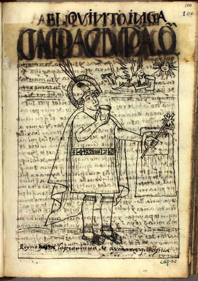 Illustration from the book El primer nueva corónica y buen gobierno